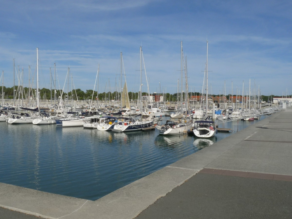 Port-Médoc, Le Verdon, Gironde, France